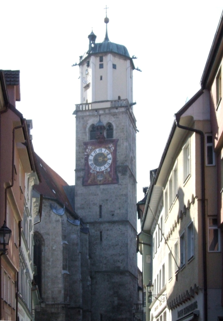 Blick vom Marktplatz auf St. Martin